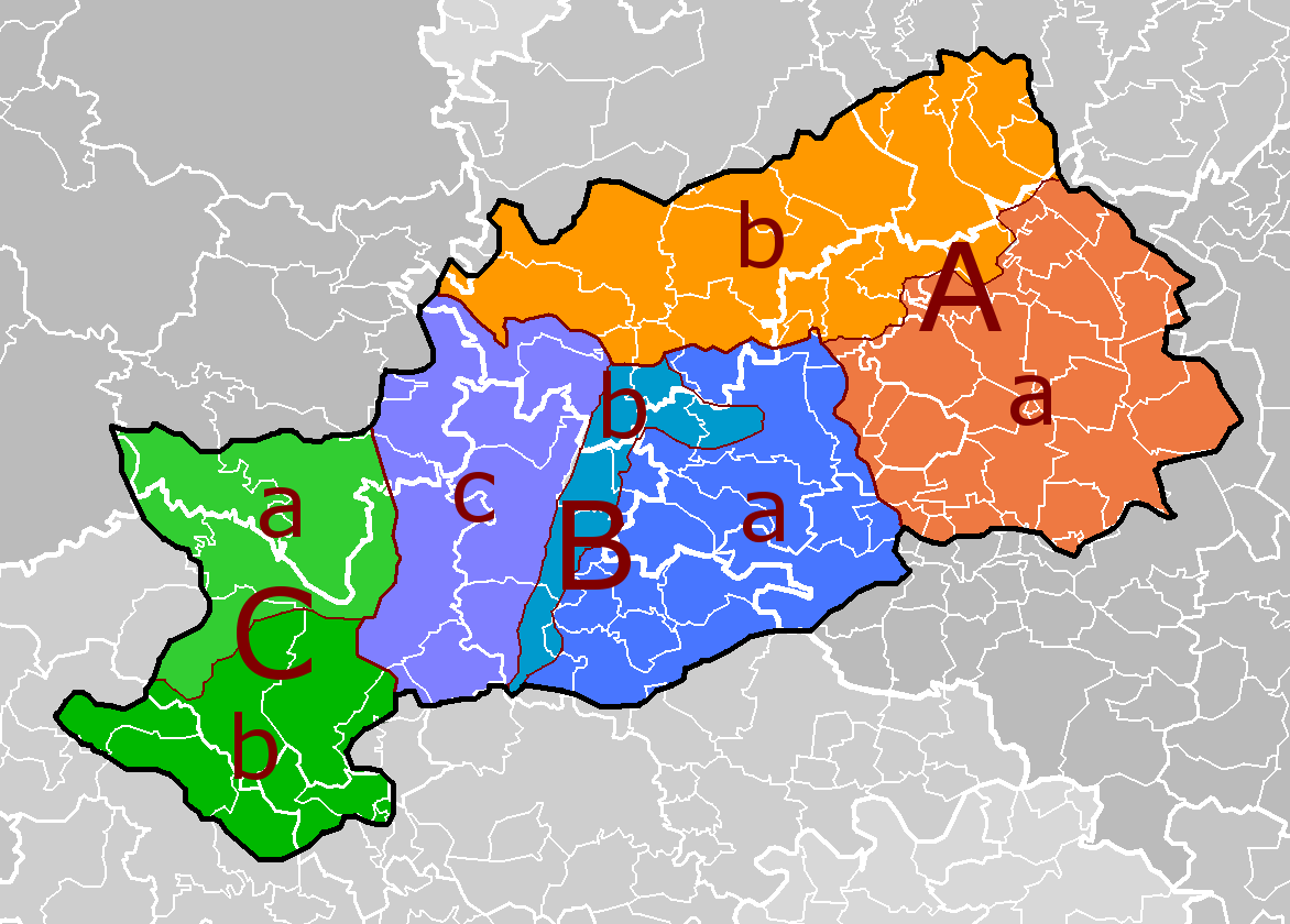 Poloha a členění geomorfologického celku Rakovnická pahorkatina na podkladové mapě územněsprávního členění Rakovnicka a severního Plzeňska. Hercynský systém Hercynská pohoří I Česká vysočina I5 (V) Poberounská subprovincie I5B (VB) Plzeňská pahorkatina I5B-1 (VB1) Rakovnická pahorkatina I5B-1-A (VB1-A) Kněževeská pahorkatina I5B-1-A-a (VB1-A-a) Rakovnická kotlina I5B-1-A-b (VB1-A-b) Kryrská pahorkatina I5B-1-B (VB1-B) Žihelská pahorkatina I5B-1-B-a (VB1-B-a) Petrohradská pahorkatina I5B-1-B-b (VB1-B-b) Žihelská brázda I5B-1-B-c (VB1-B-c) Rabštejnská pahorkatina I5B-1-C (VB1-C) Manětínská vrchovina I5B-1-C-a (VB1-C-a) Manětínská kotlina I5B-1-C-b (VB1-C-b) Lomská vrchovina